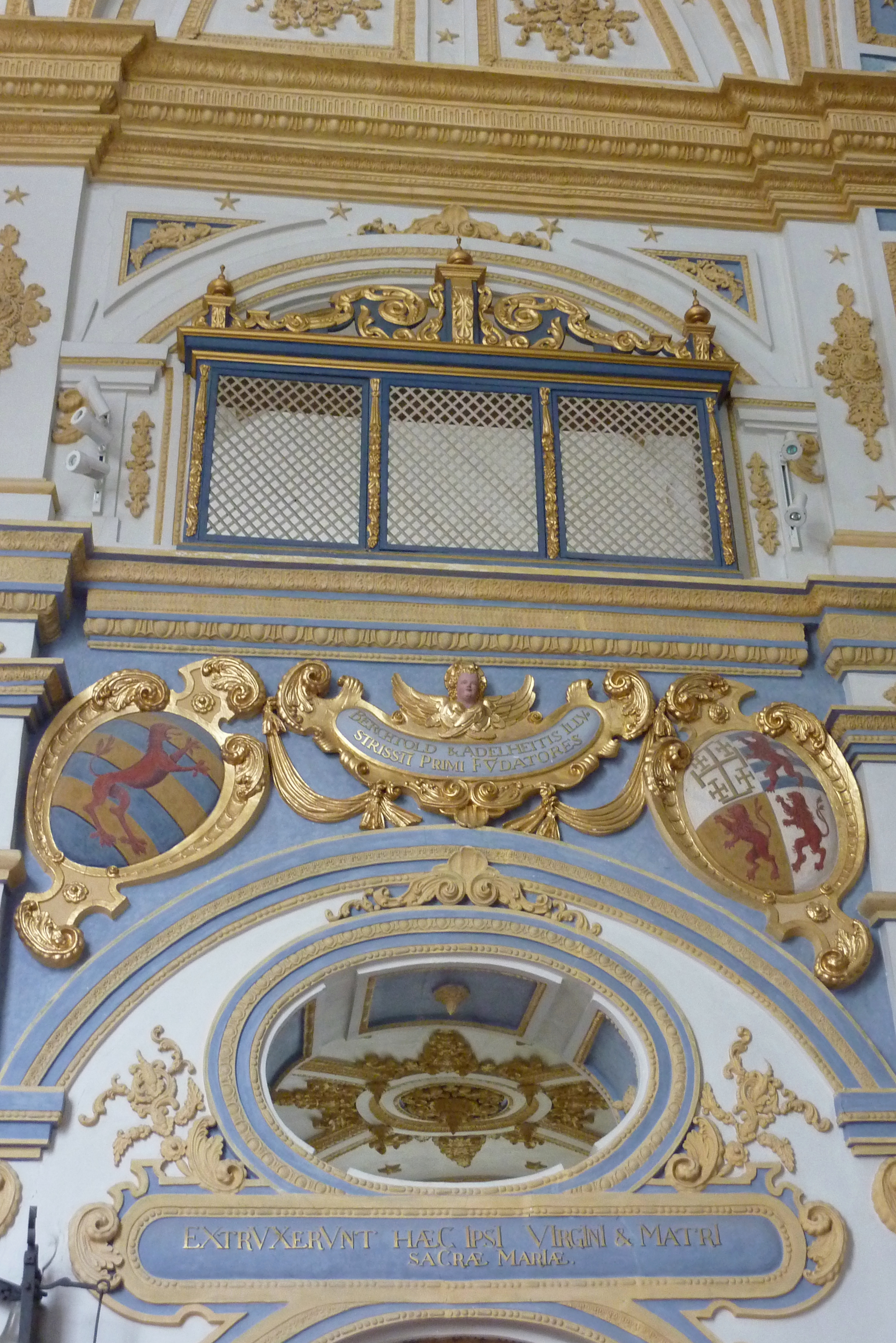 Katholische Pfarrkirche Mariä Himmelfahrt, ehemalige Klosterkirche des Zisterzienserinnenklosters Niederschönenfeld im Landkreis Donau-Ries (Bayern), von 1659 bis 1662 Wiederaufbau durch Konstantin Pader, Stuckdekor von Konstantin Pader, Wappenkartuschen über dem Durchgang zur Chorkapelle: Berthold III. von Graisbach und Ehefrau Adelheid, geb. Prinzessin von Zypern (aus dem Hause Lusignan)